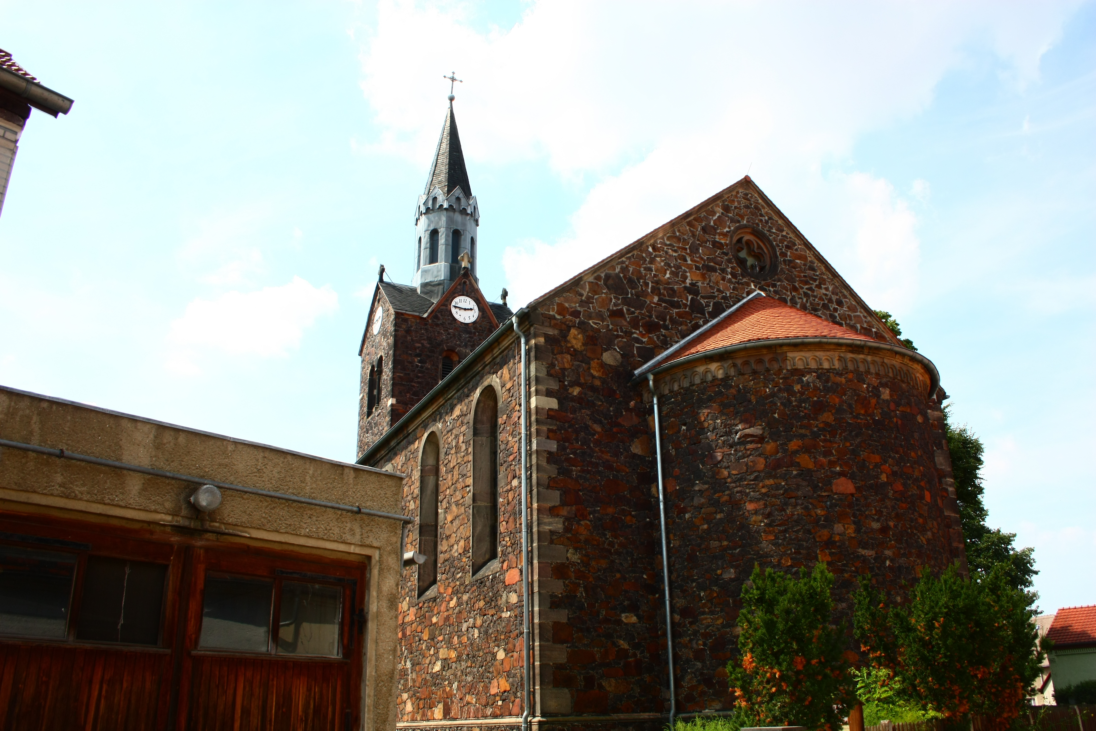 die Kirche in Niemberg im Saalekreis